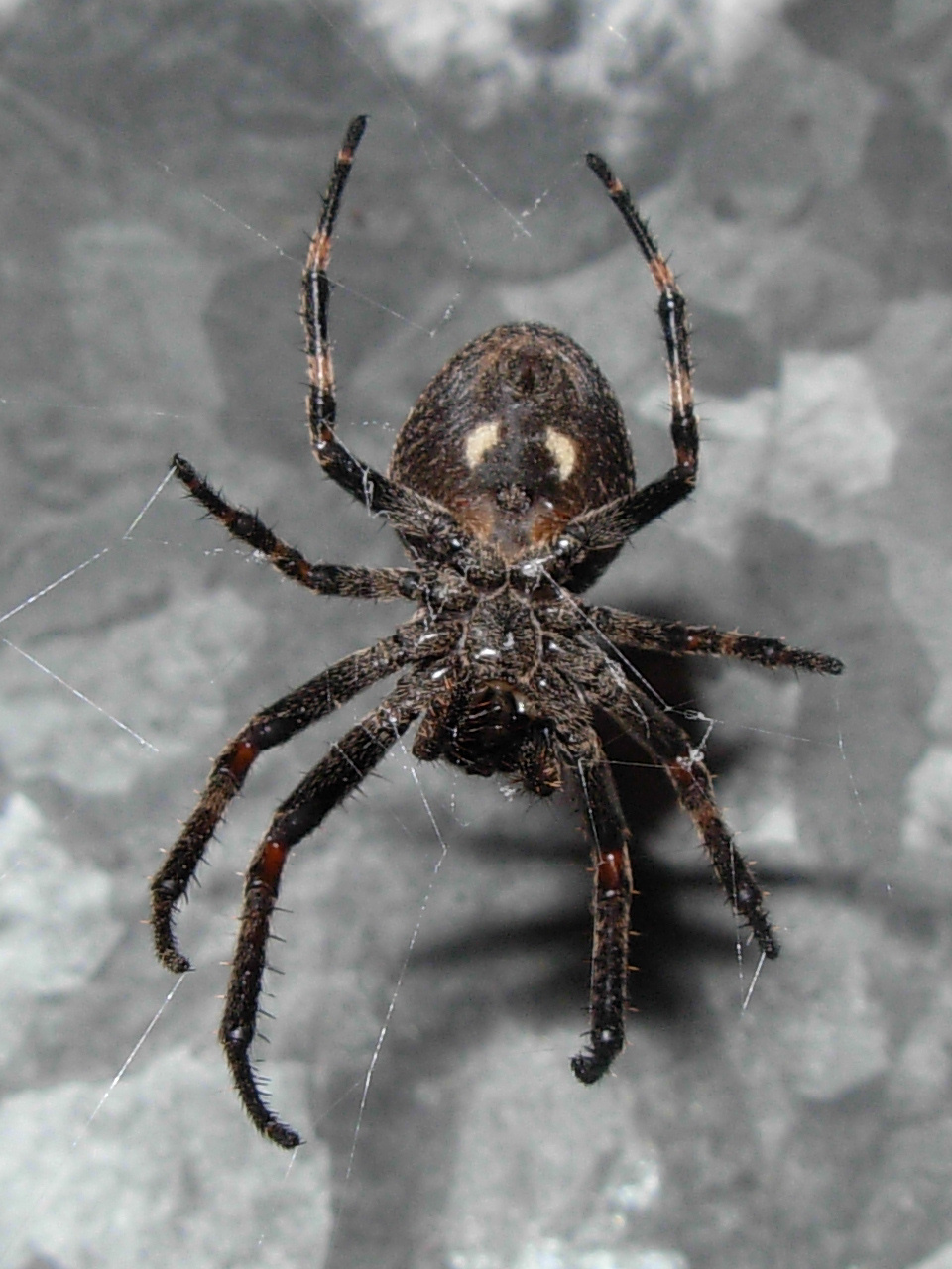 Nuctenea umbratica (venter)